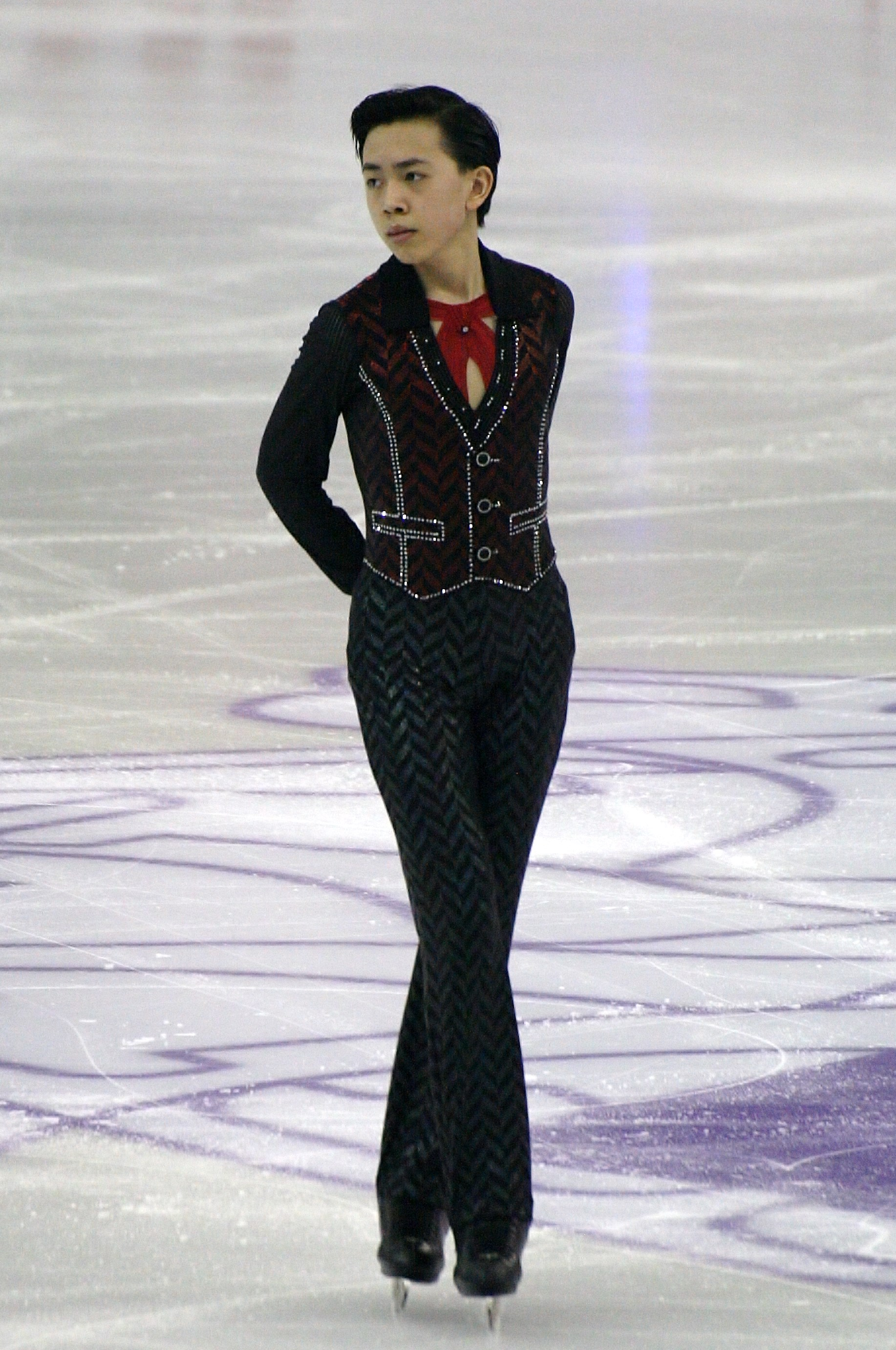 Винсент Чжоу (США) на финале Гран-при по фигурному катанию среди юниоров 2015-2016.